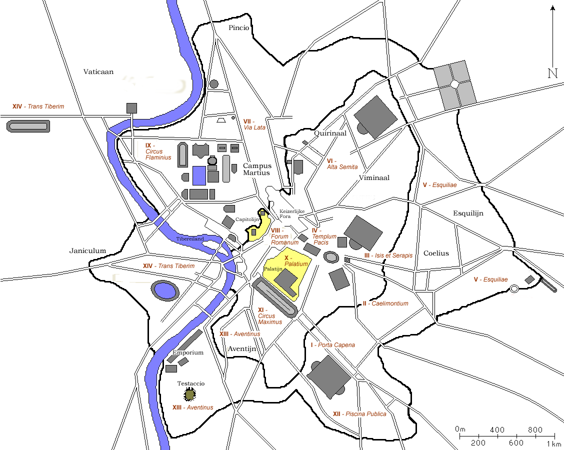 Kaart van antiek Rome.